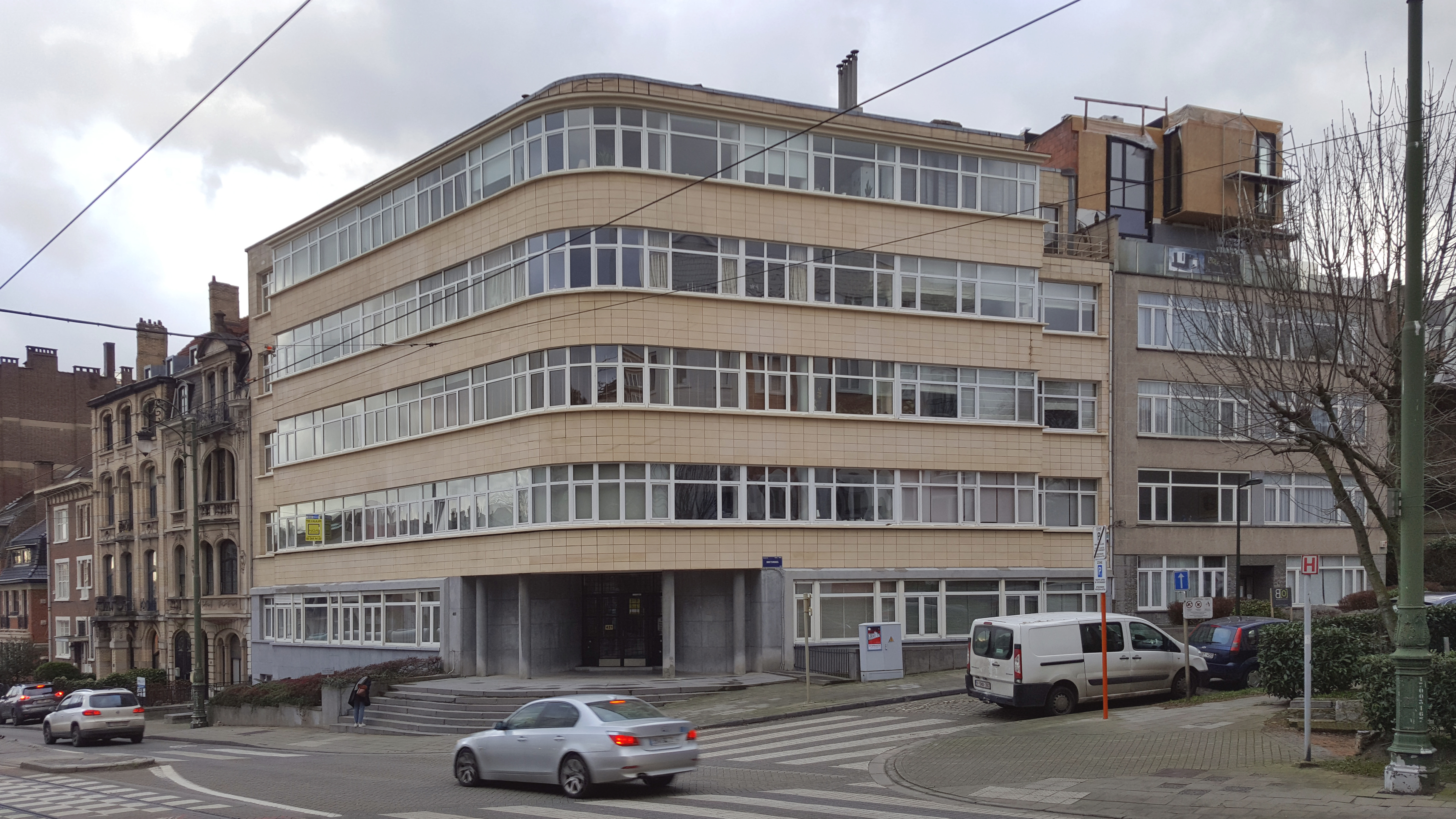 1935, avenue Brugmann, 1180 Uccle